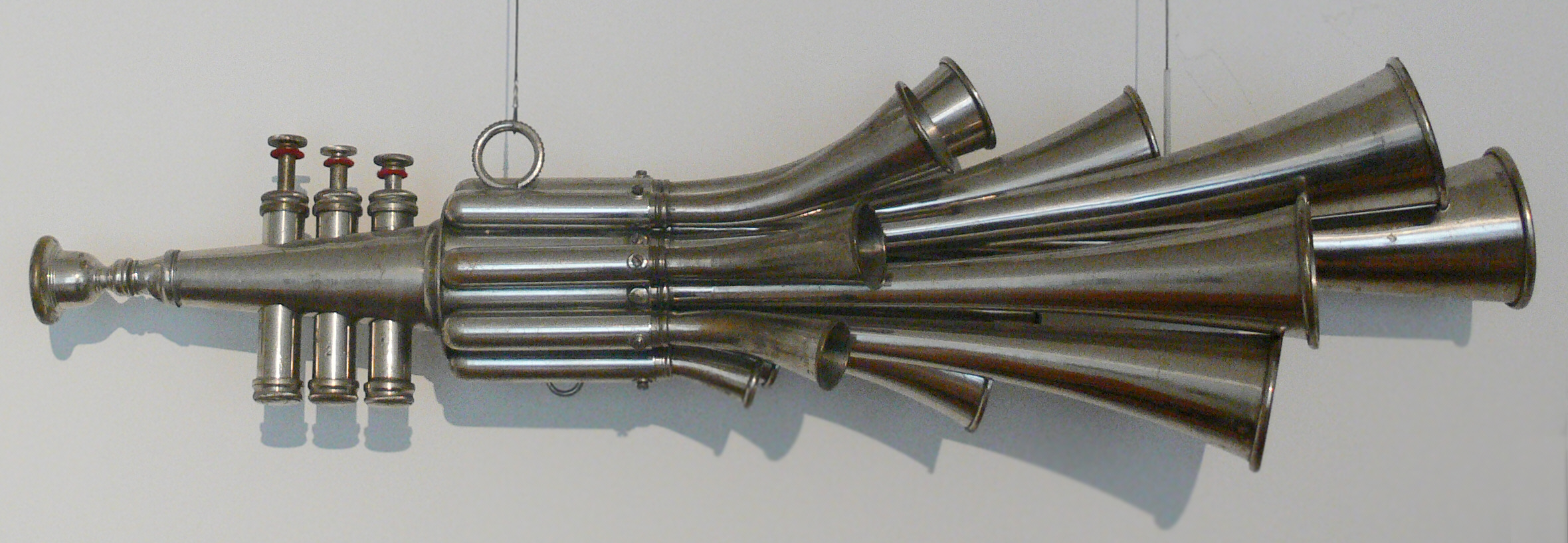 Martinstrompete („Schalmei“), Messing verzinkt, um 1930 Landesmuseum Württemberg (Außenstelle Museum für Volkskultur in Württemberg, Waldenbuch)